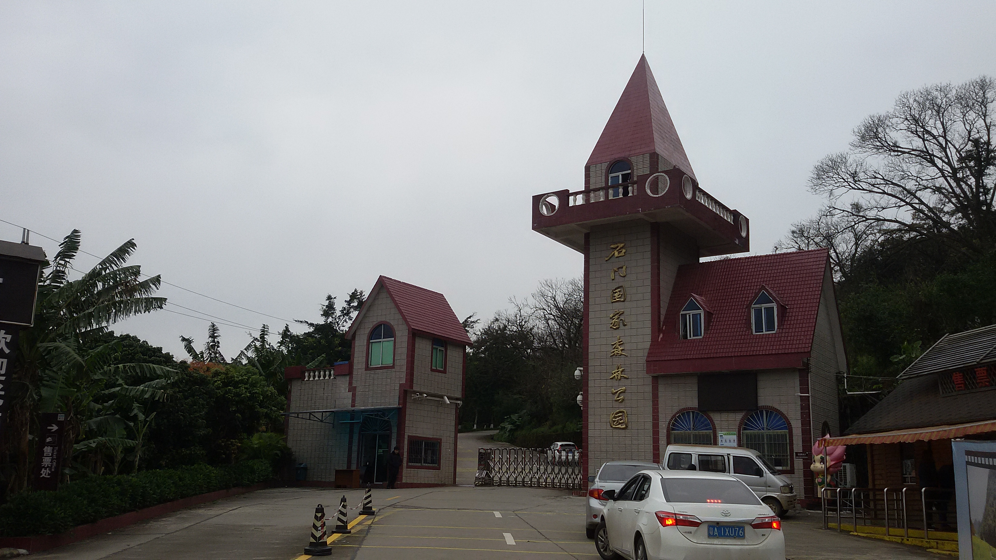 粵語: 石門國家森林公園嘅正門